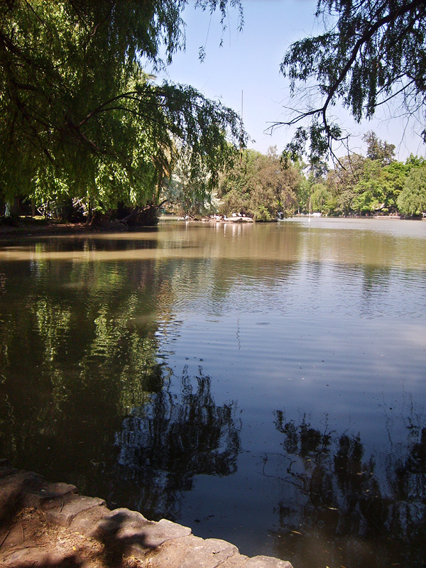 Una de las dos lagunas artificiales dentro del Parque O'Higgins en Santiago de Chile.